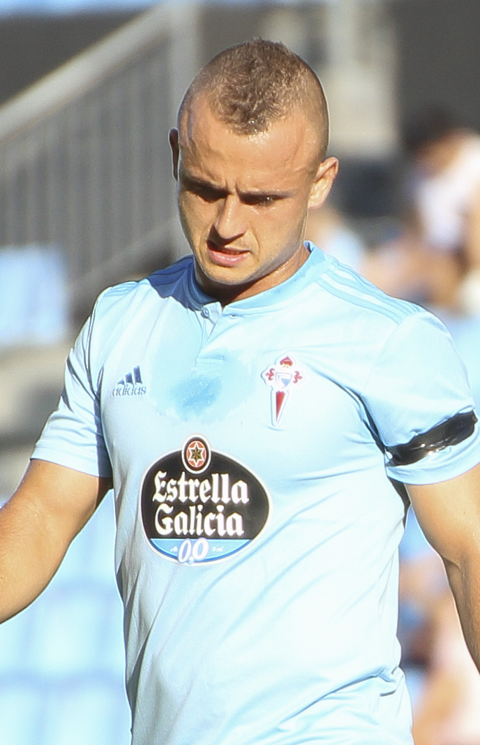 Presentación RC Celta - Temporada 18/19